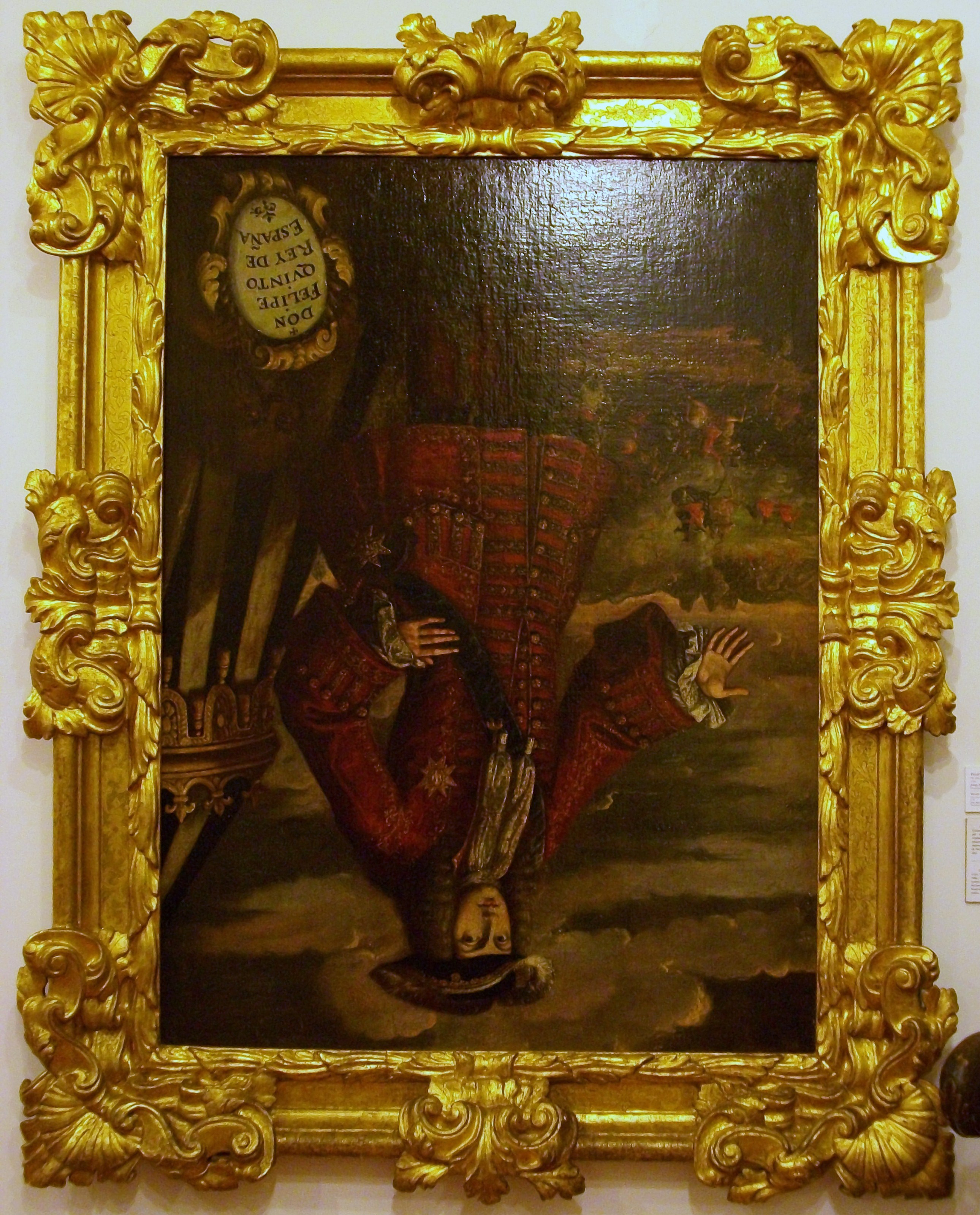 Retrat de Felip Vé cap per avall a l'Almodí de Xàtiva.